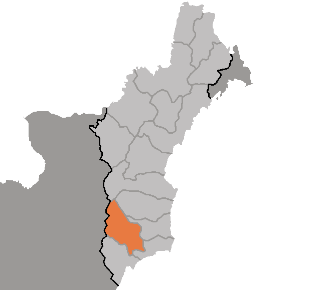 Map of Kilju, Hamgyong-pukto, DPRK, 2006